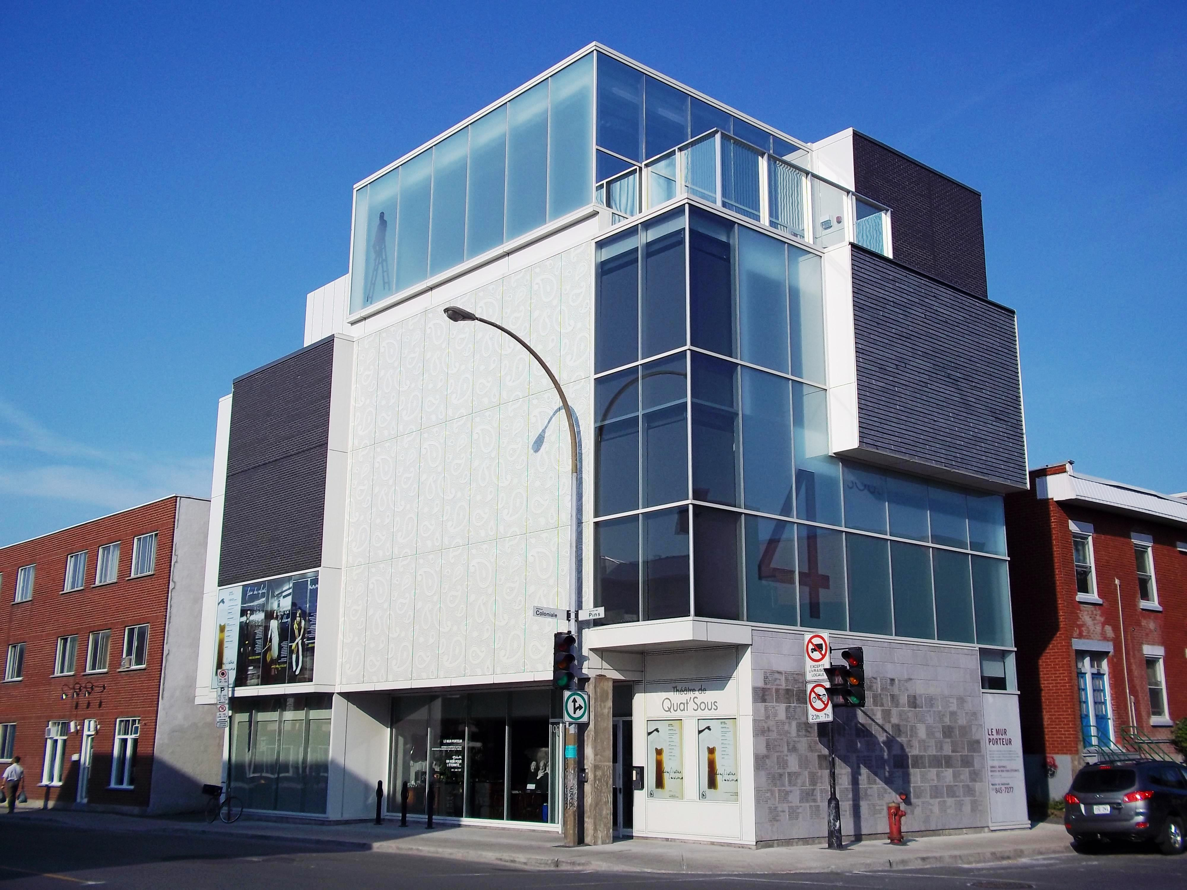 Théâtre de Quat'Sous, 100, avenue des Pins Est, Montréal